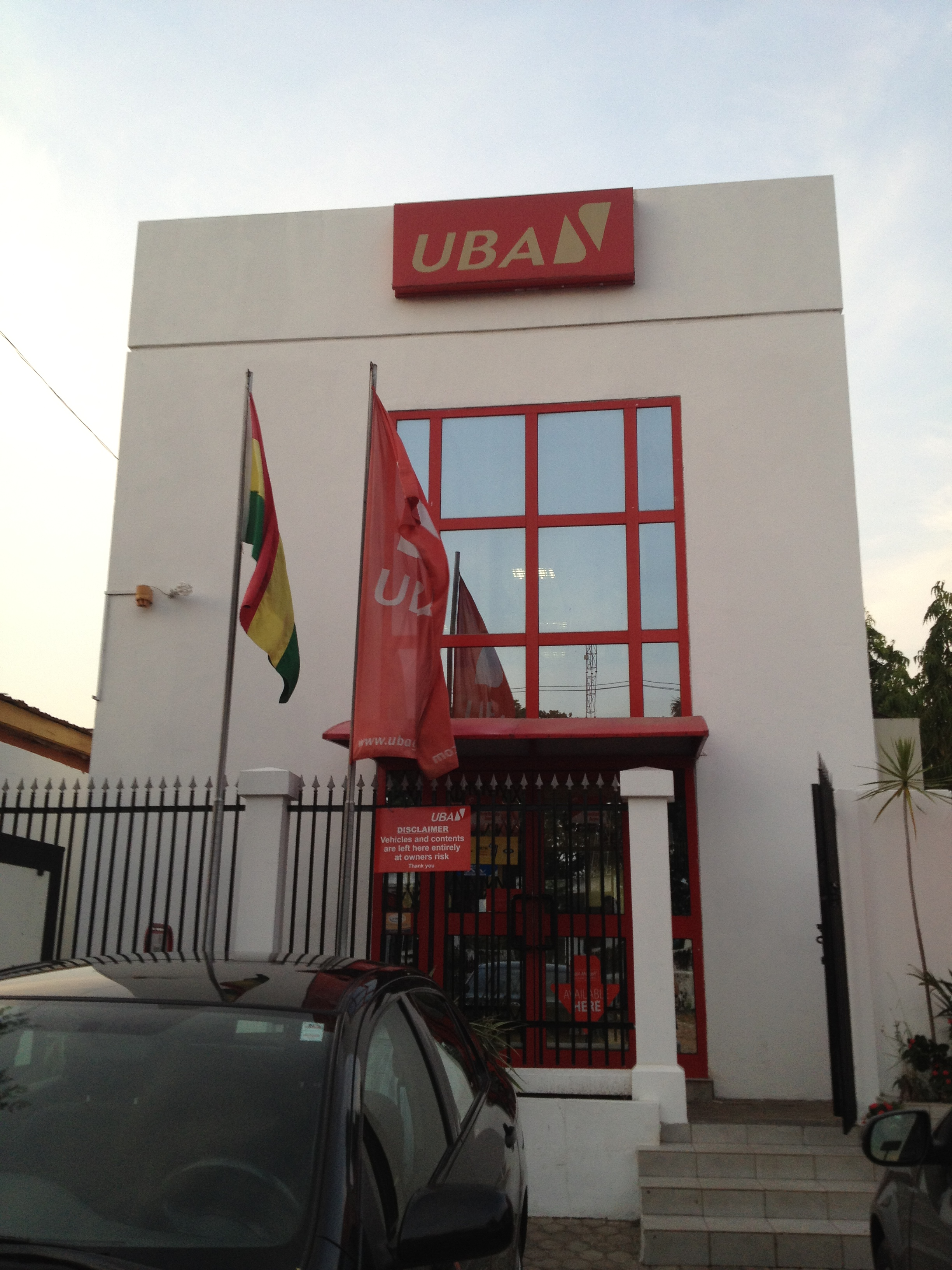 アクラにあるUnited Bank for Africaの支店